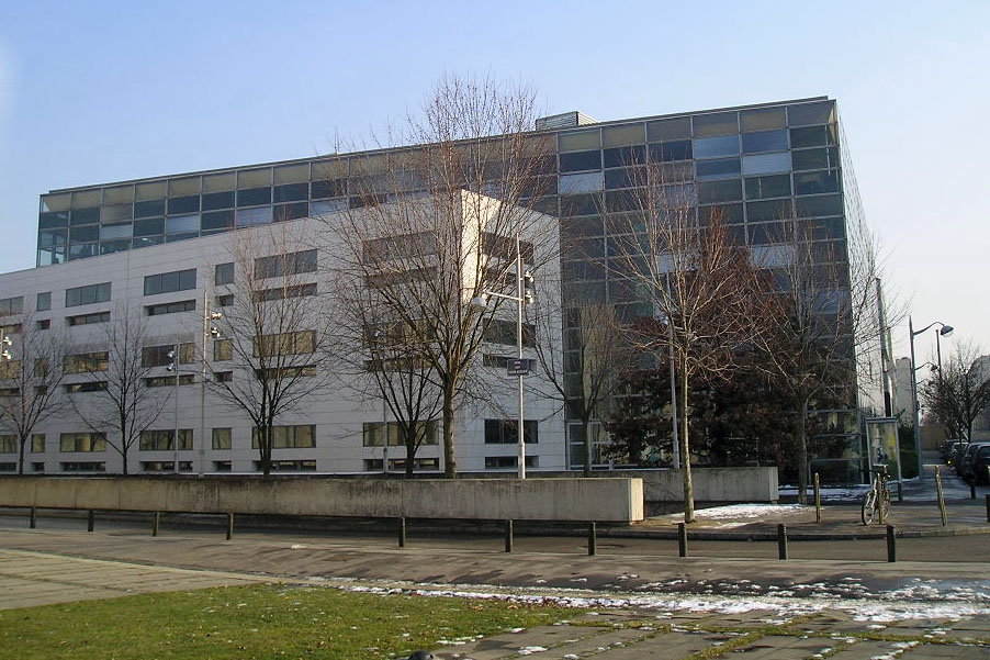 Vue de l'EEIGM en hiver depuis le parvis de l'école d'architecture